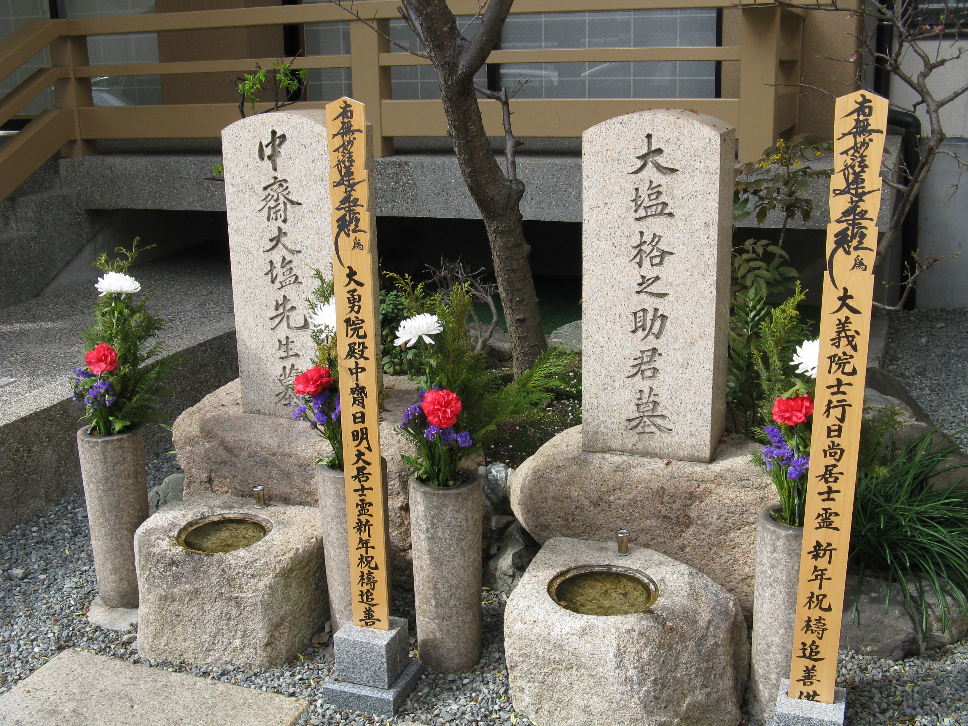 成正寺の大塩平八郎・格之助の墓